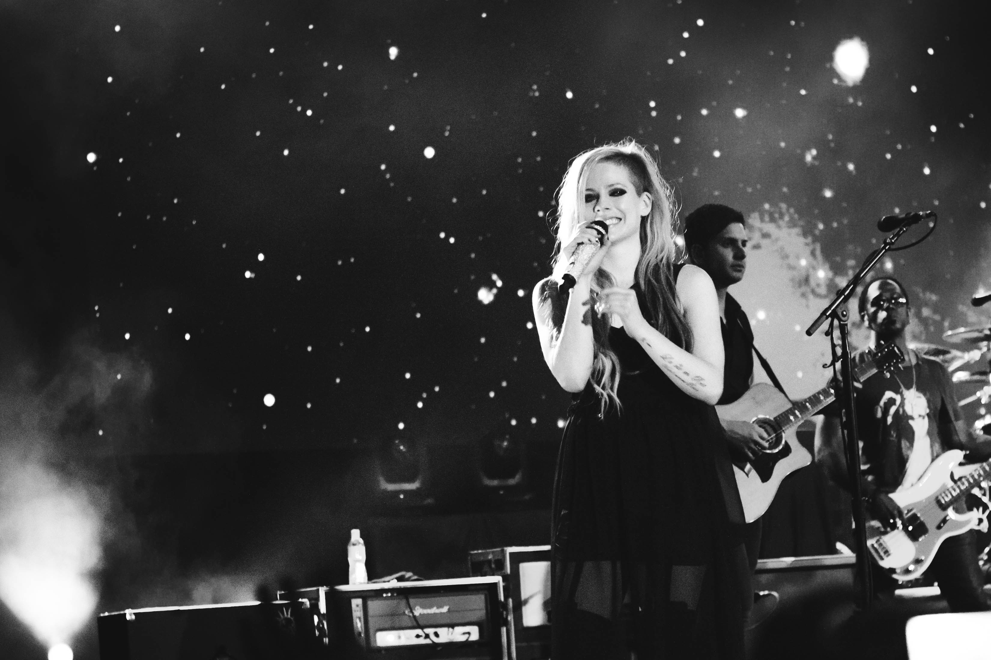 Avril Lavigne in Brasilia, Brazil in The Avril Lavigne Tour